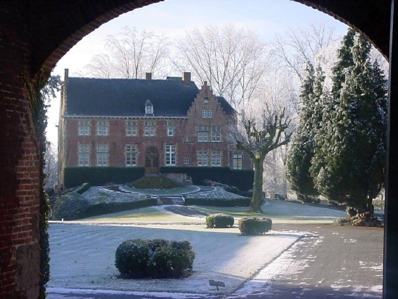 Oud Kasteel van Vichte